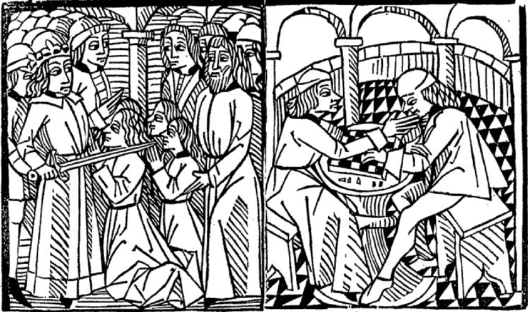 Adoubement de Renaud et partie d'échecs contre Bertholai. Gravure dans Les quatre fils Aymon (1483-1485) attribué à Huon de Villeneuve, ark:/12148/bpt6k1110648, Bibliothèque nationale de France